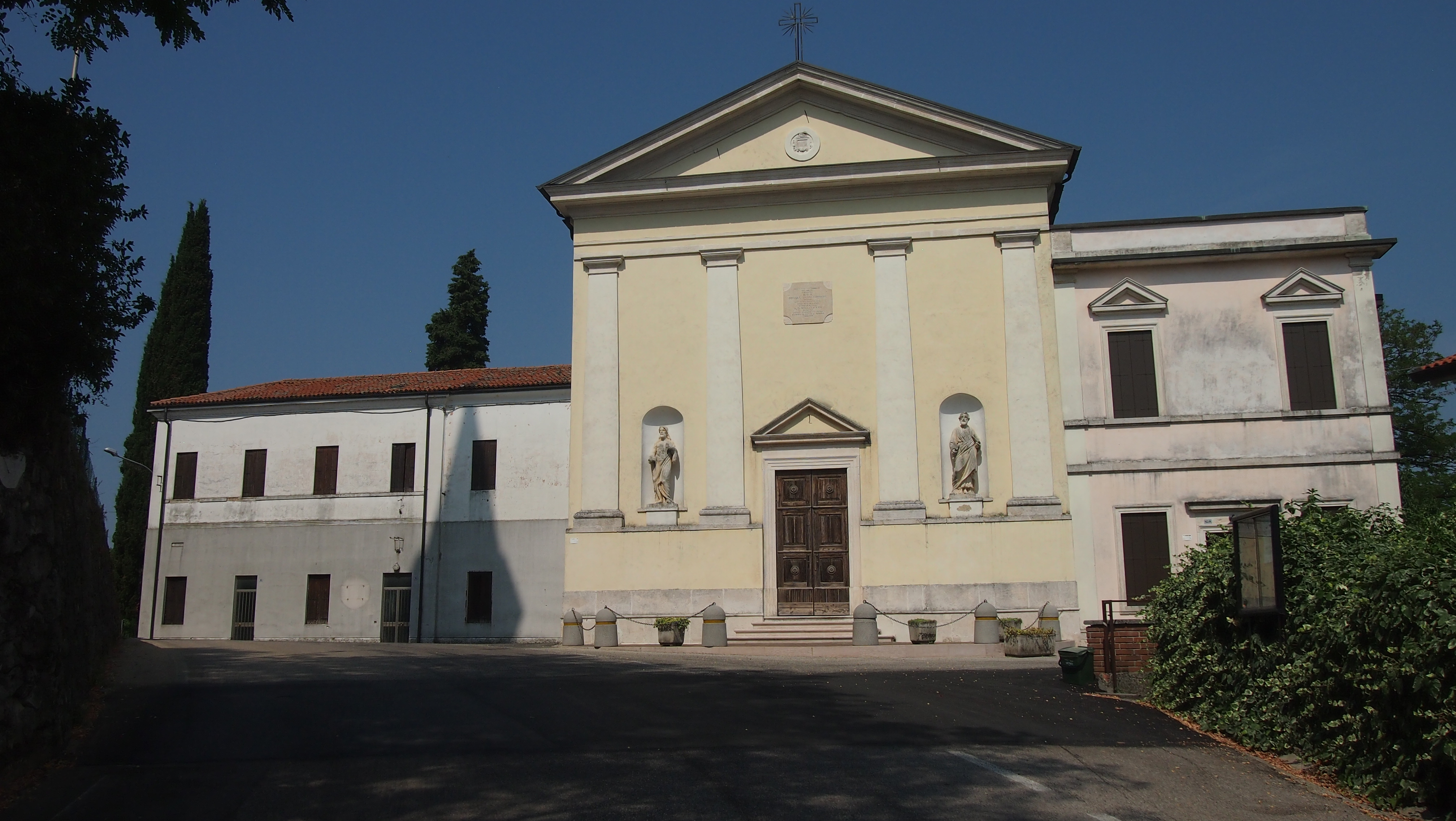 Chiesa di San Giovanni Battista a Pianezze di Arcugnano, con la canonica a destra.